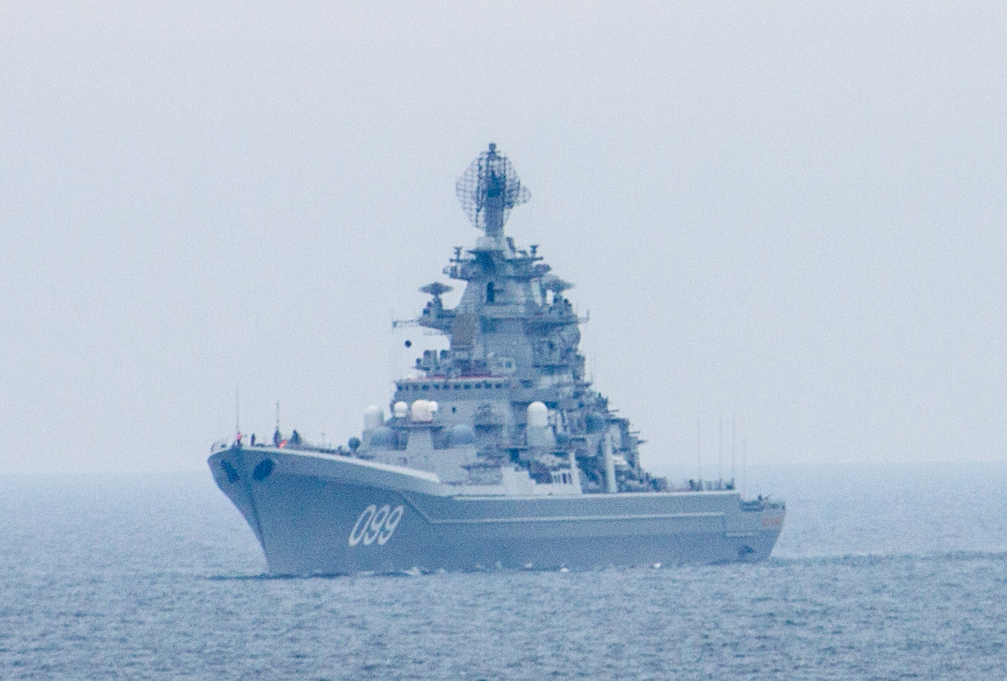 Russian battlecruiser Pyotr Velikiy